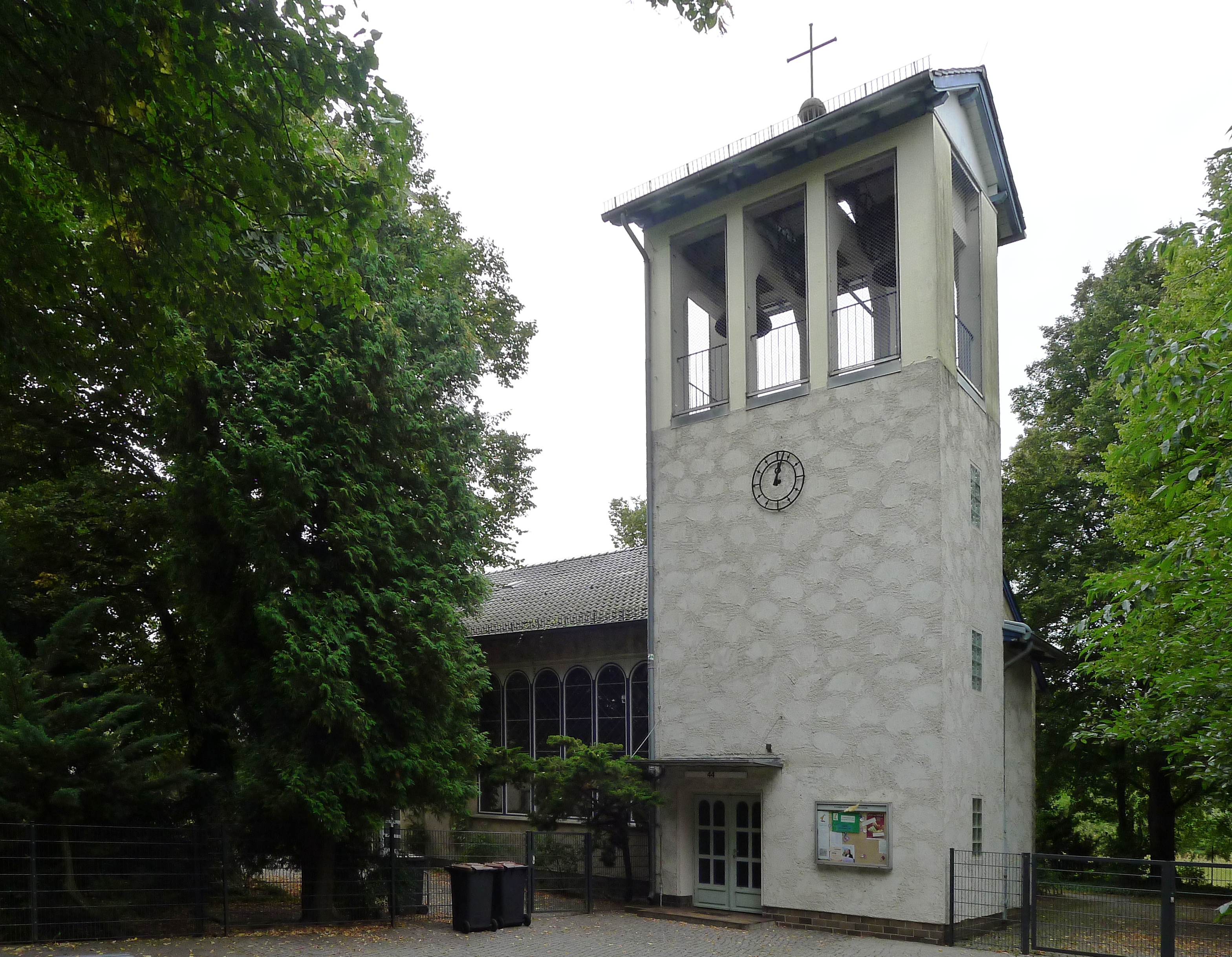 Blick auf die Kirche